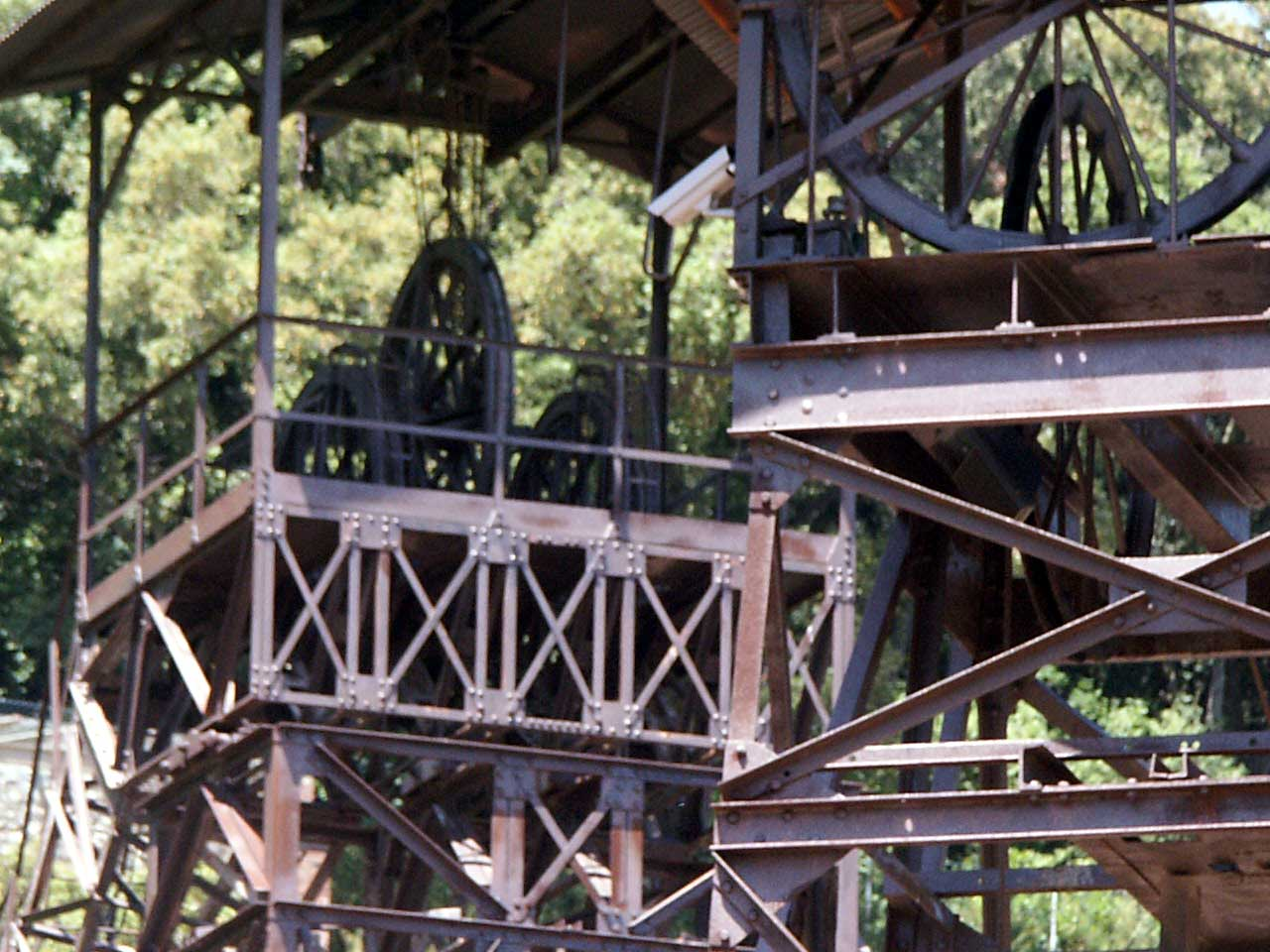 Miniera Ravi Marchi Parco Tecnologico ARcheologico delle Colline Metallifere Grossetane